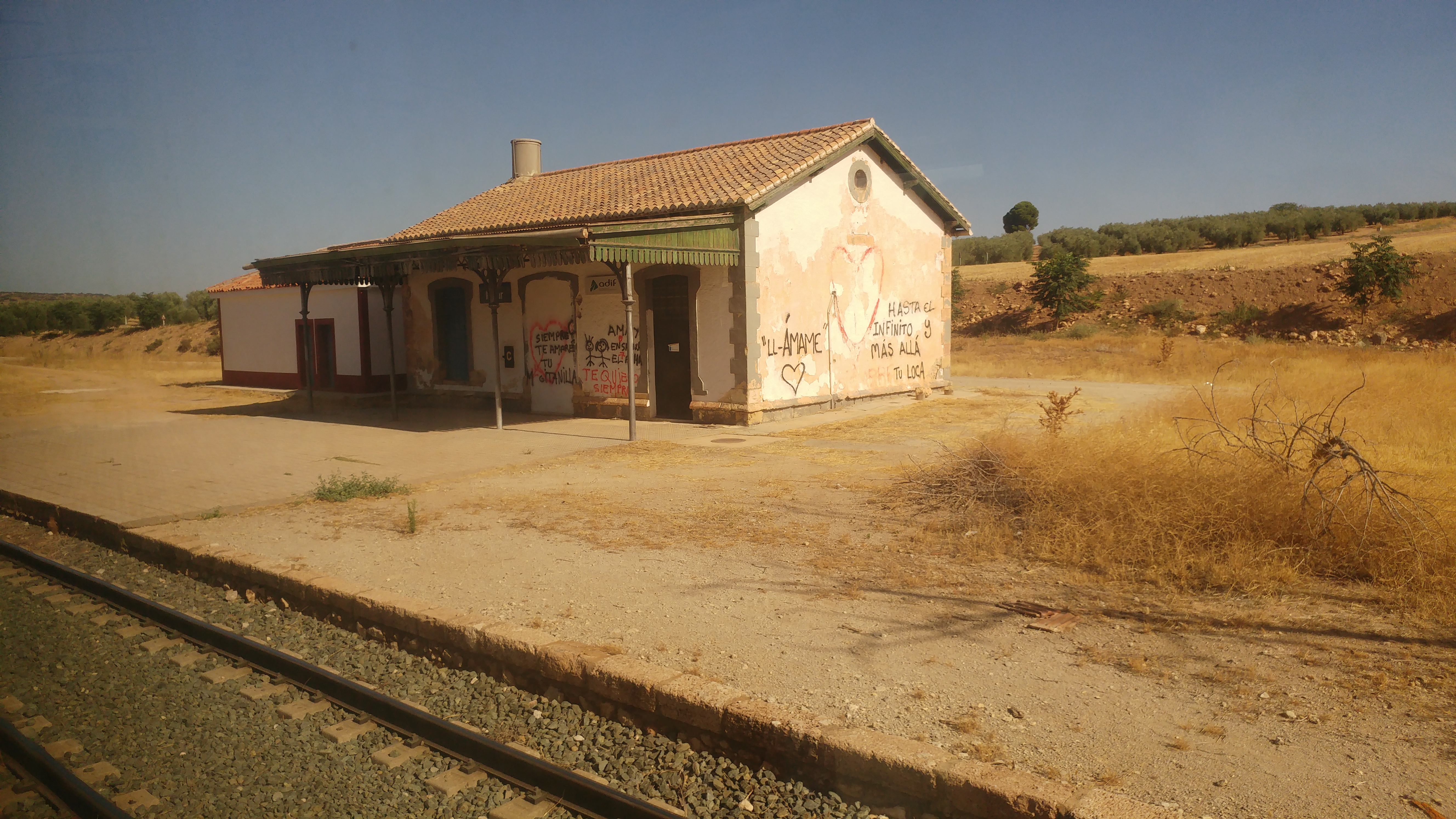 Estación de Píñar: Esta foto fue tomada el 23 de agosto de 2017 en un tren Media Distancia con destino Guadix y Almería que efectuó parada en la estación por regulación del tráfico ferroviario.